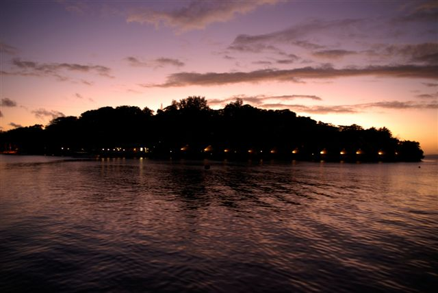 Iririki Island